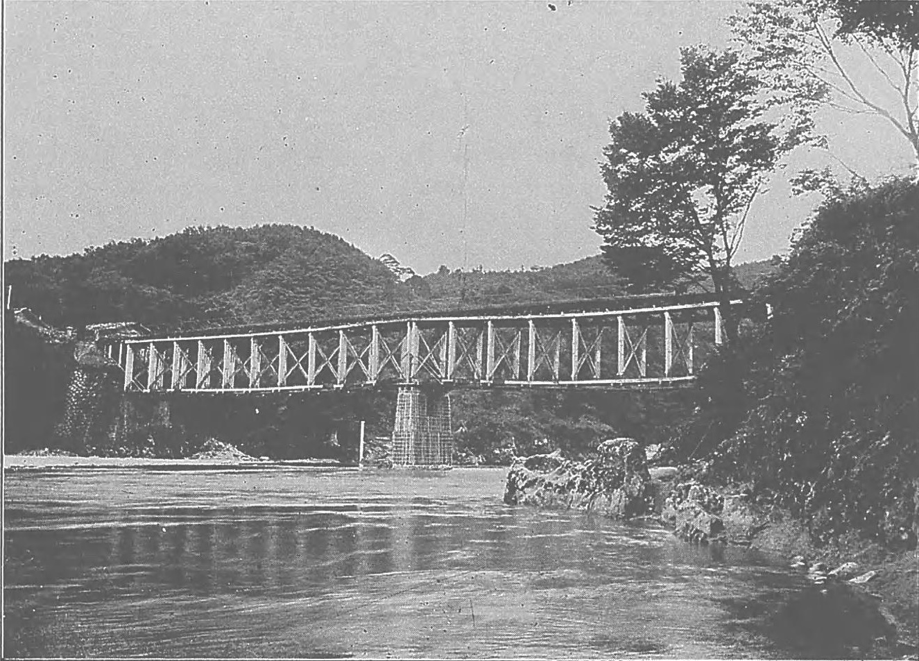 説明文に「婦負郡細入村大字笹津村と上新川郡大沢野村大字笹津村とを縫て神通川に架せる橋なり両岸の巒渓翠色滴らんとし碧水其間を流れ景勝掬すべし之より上流数里にして山愈〻迫りて谷愈〻深く脚下千仭奔湍崖に激し岩を囓み石を転じて人をして慄然たらしむ」とあり